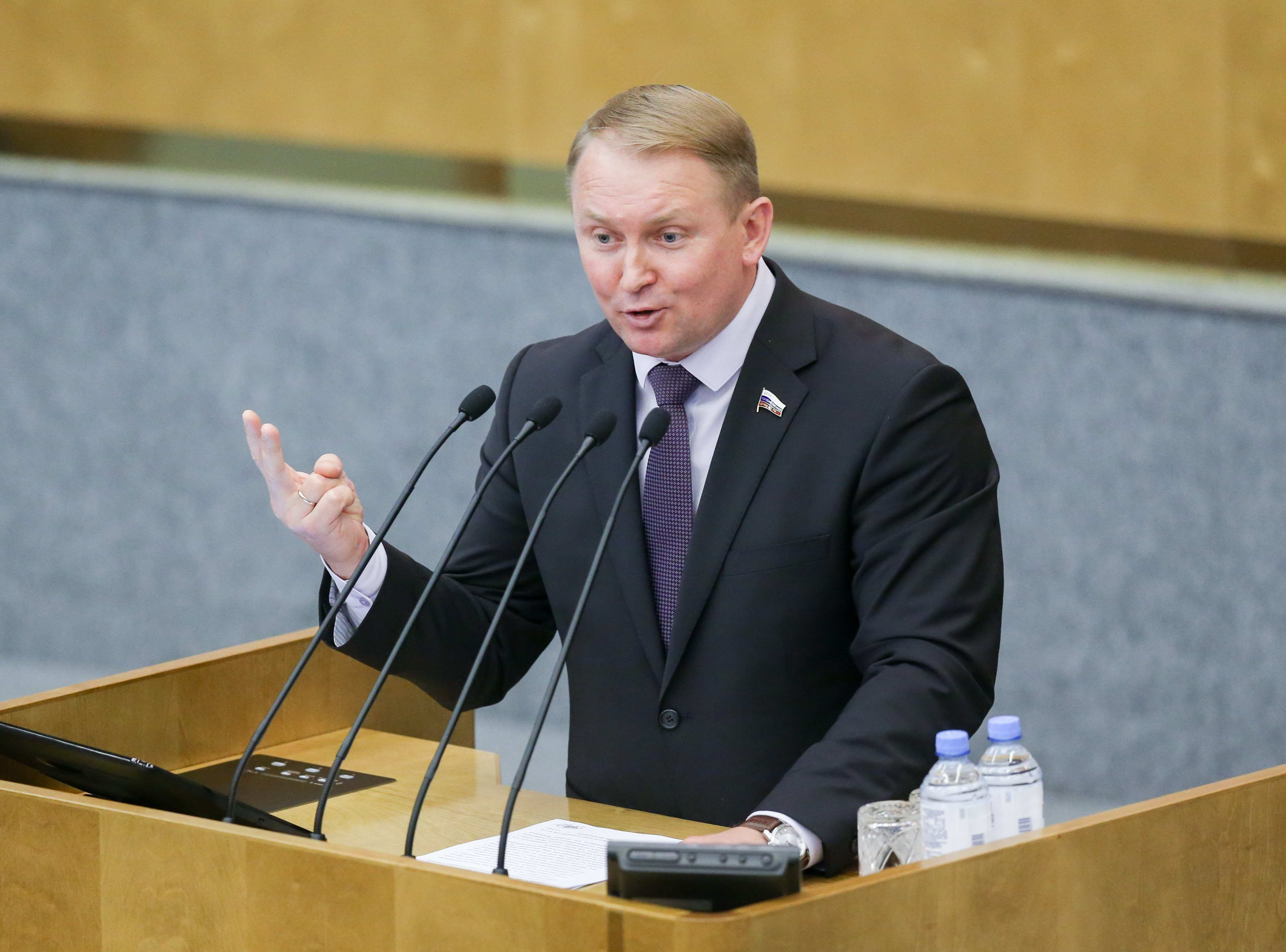 Александр Шерин